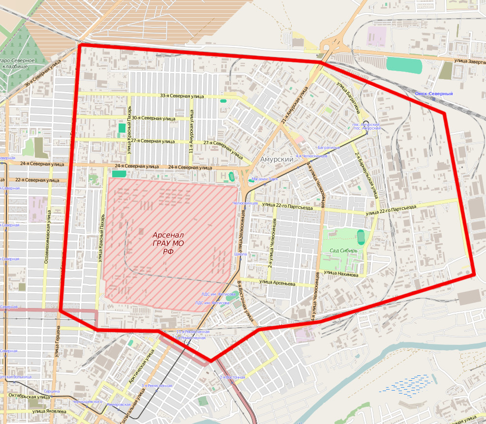 План Амурского поселка города Омска.